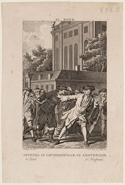 Spinoza in levensgevaar, te Amsterdam. "XI. boek, 3e deel, 9e hoofdstuk". Uit: Historie der Joden, vervolg op Flavius Josephus; bij J. van Gulik, Amsterdam. 1784. Afmetingen: 133x89 mm